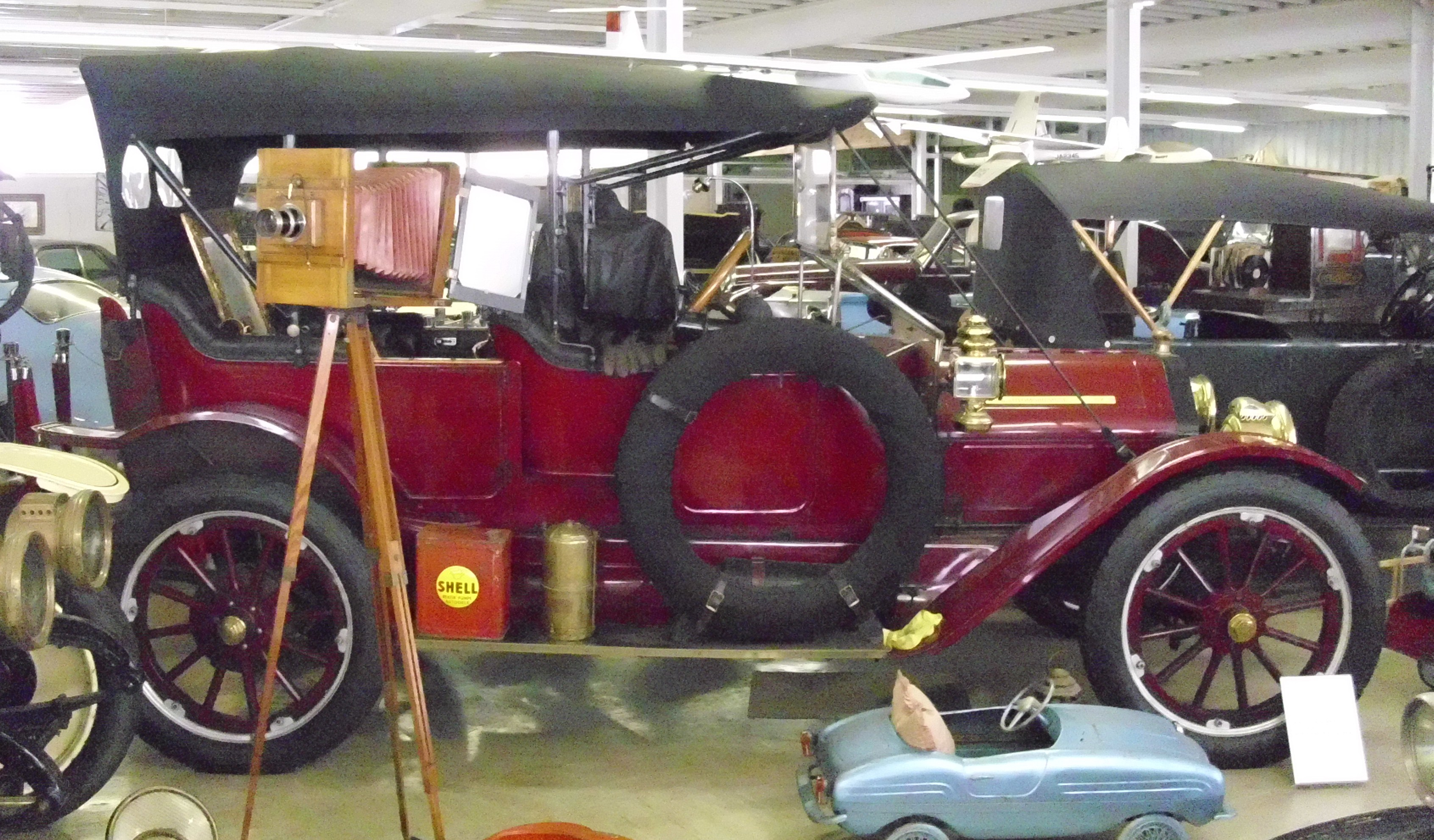 EMF 1912 im Automobilmuseum Stainz